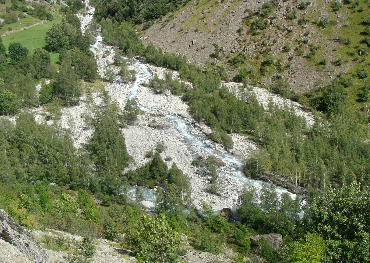 Le confluent de la Séveraisse (en haut) et du torrent du Gioberney (en bas).